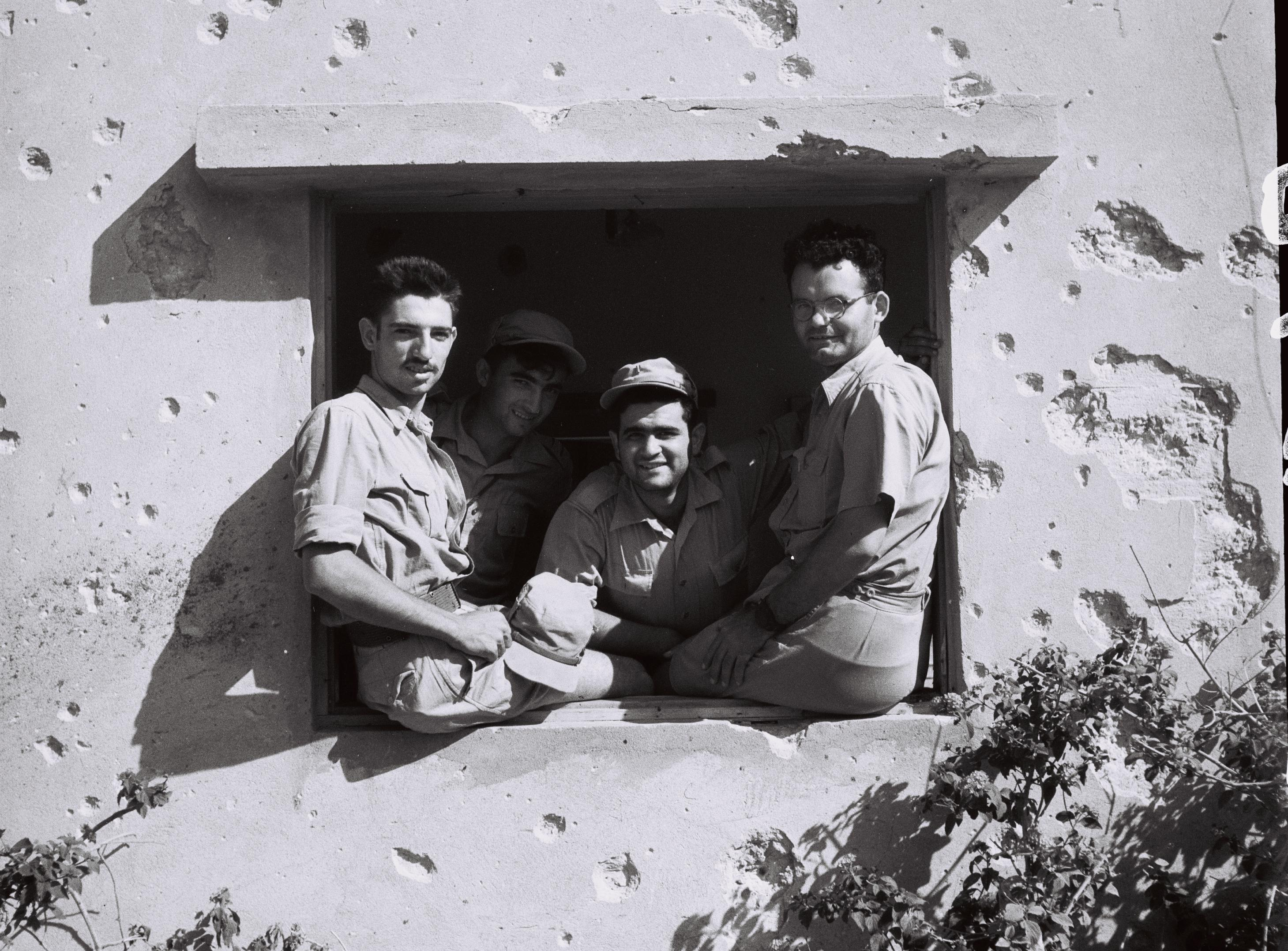 The War of Independence. In the photo, the defenders of Kibbutz Negba. מלחמת העצמאות. בתמונה: חיילים המוצבים בקיבות נגבה